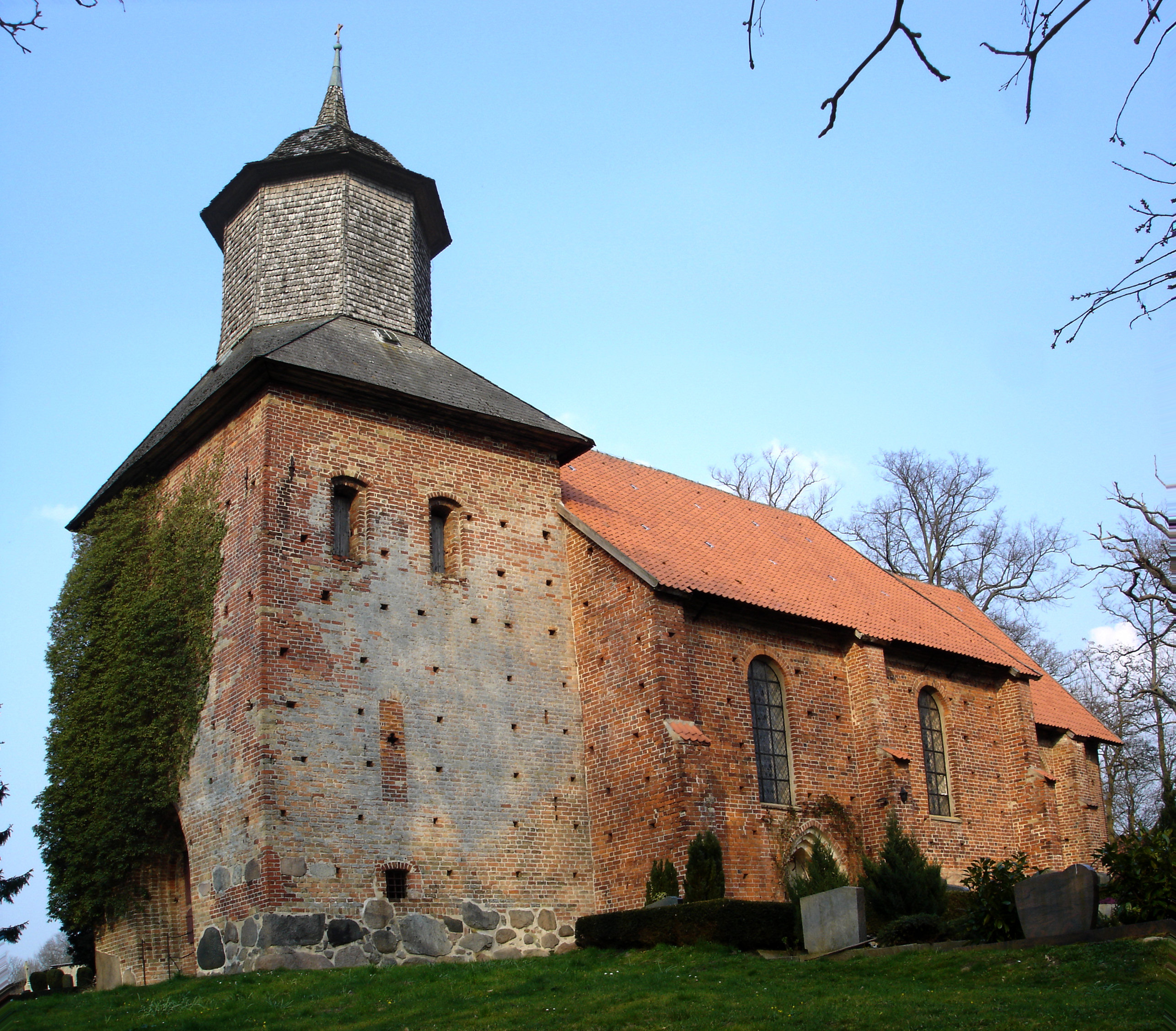 Kirche in Kirch-Grambow / Church in Kirch-Grambow (Mecklenburg-Western Pomerania)